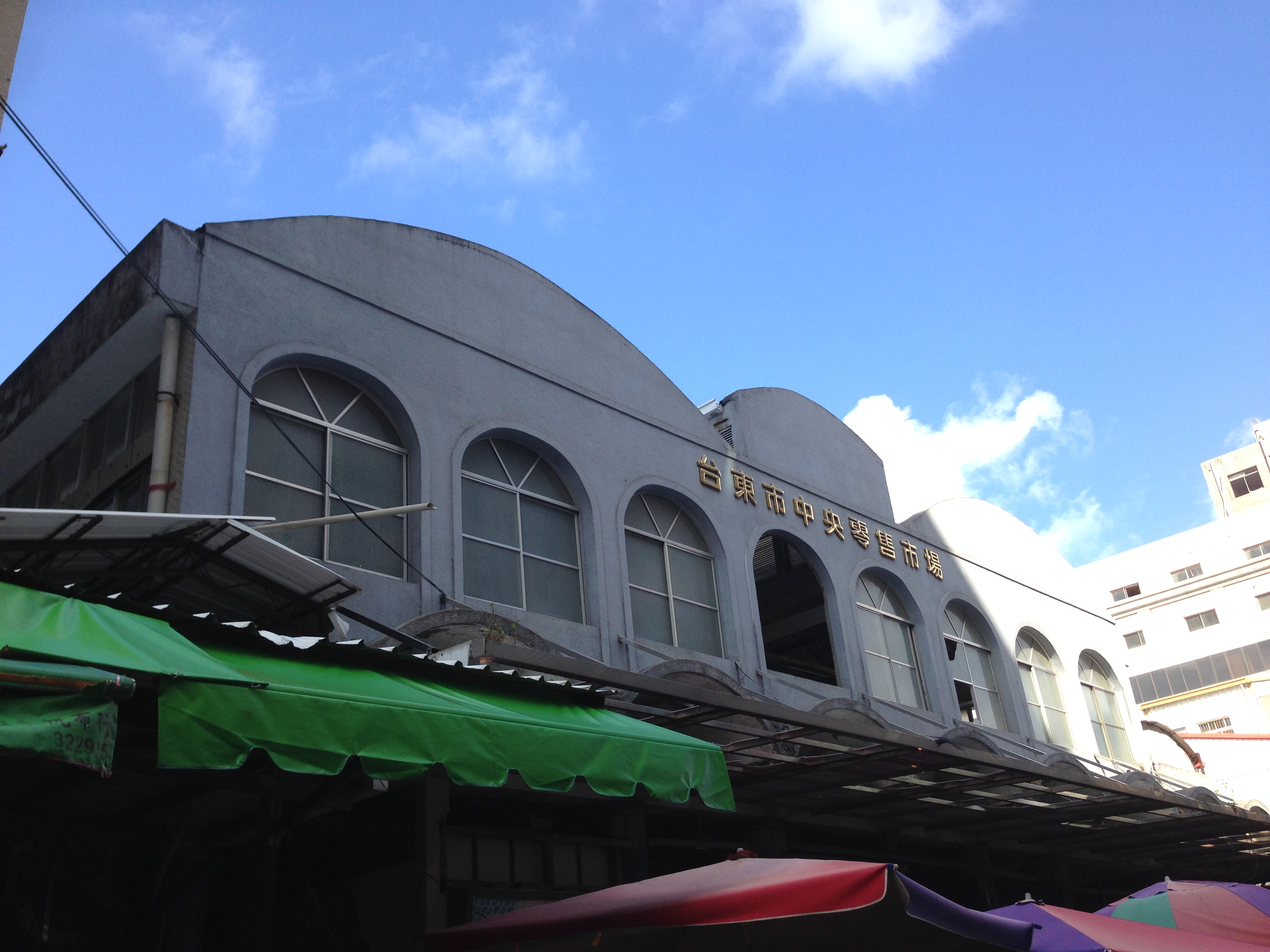 中文（台灣）: 台東市中央市場